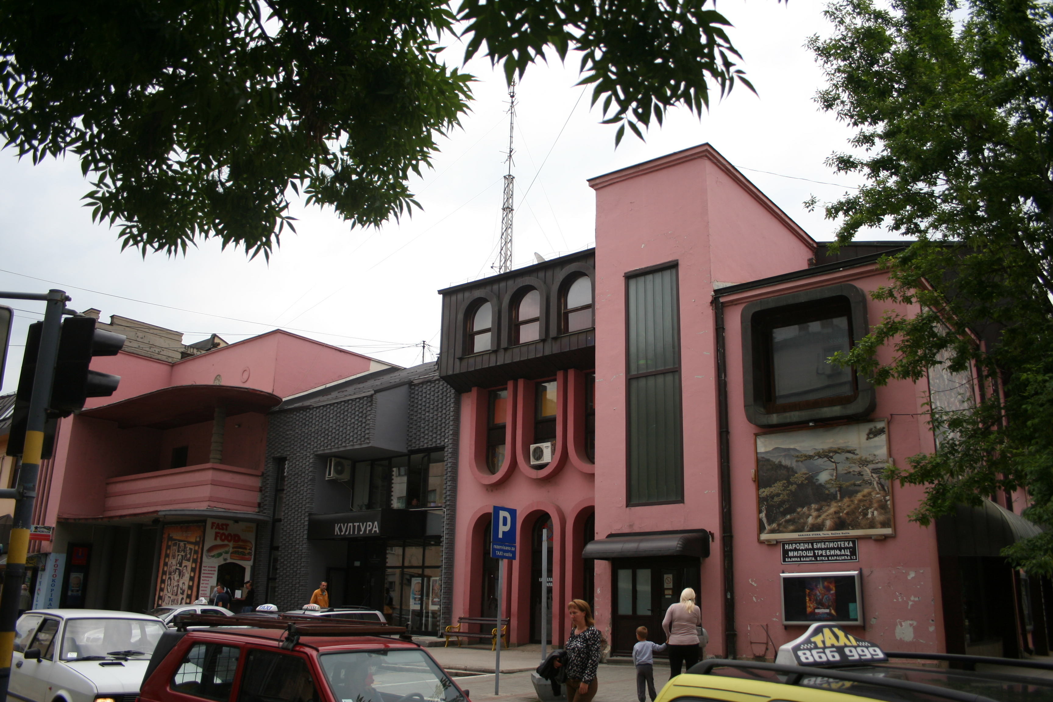 Bajina Bašta u maju 2017.